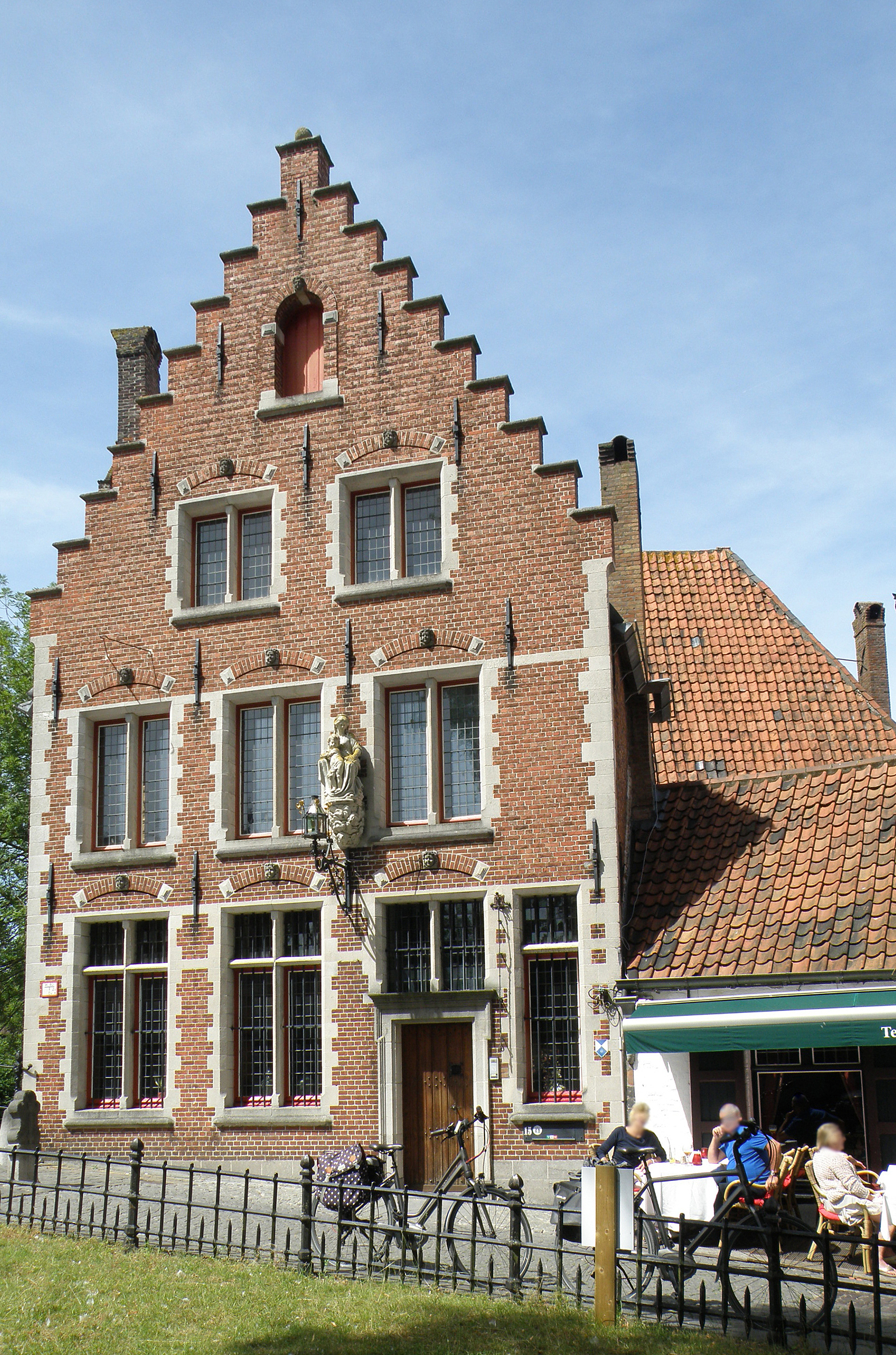 Brugge, Begijnhof. Pastorie van de begijnhofparochie, Wijngaardplein nr. 15.